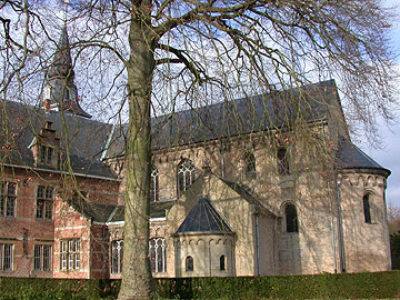 Zelf gemaakt, GNU